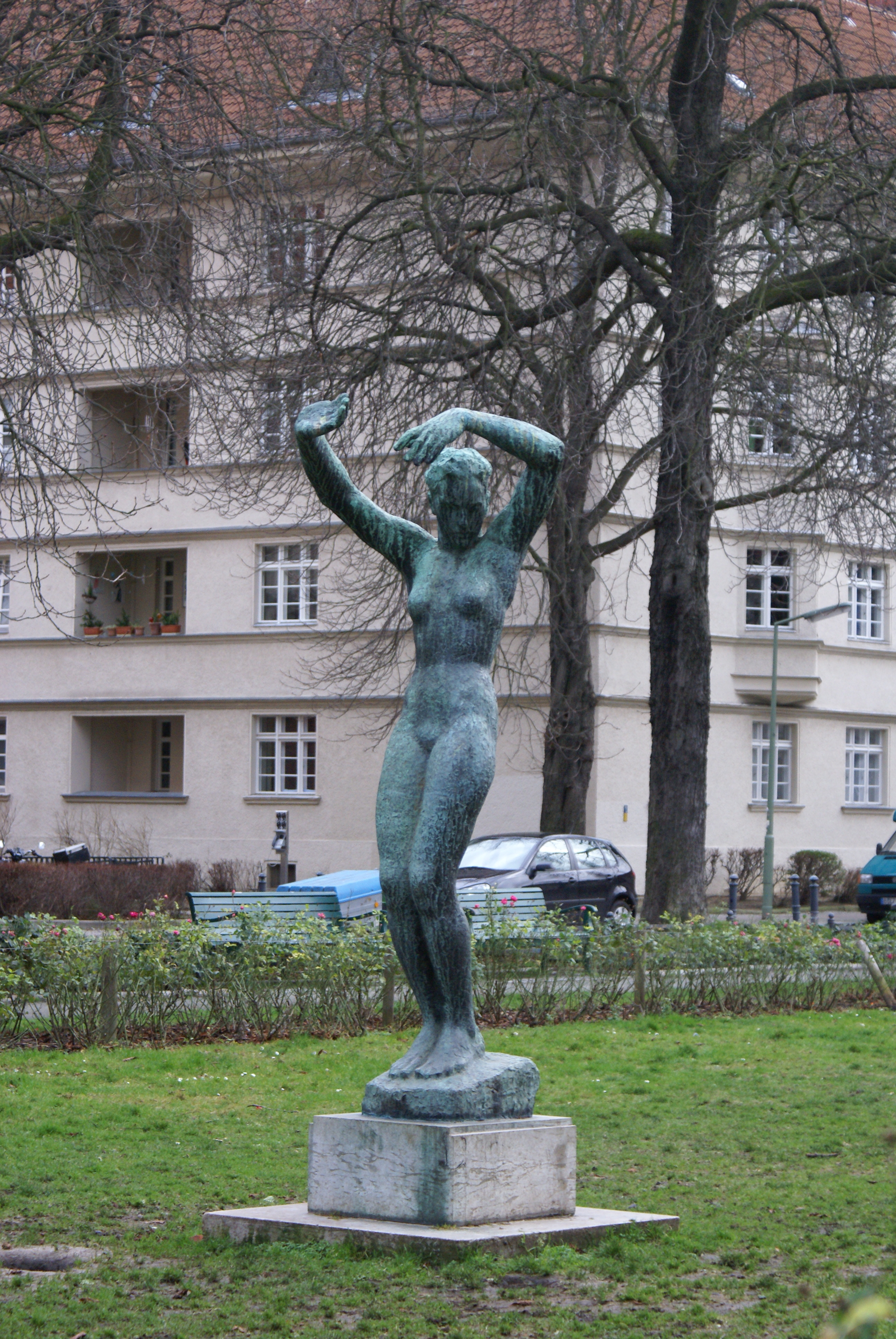 Georg Kolbes Skulptur „Der Morgen“ in Berlin-Schöneberg/Germany Urheber: Emmridet